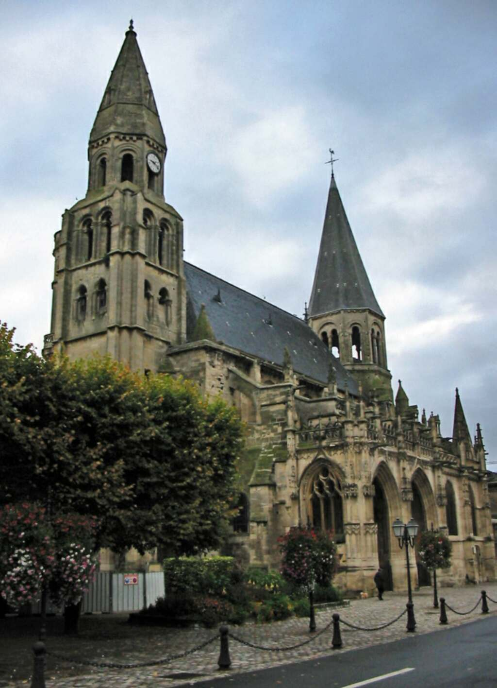 Collégiale Notre-dame de Poissy (Yvelines) Photo JH Mora, septembre 2005